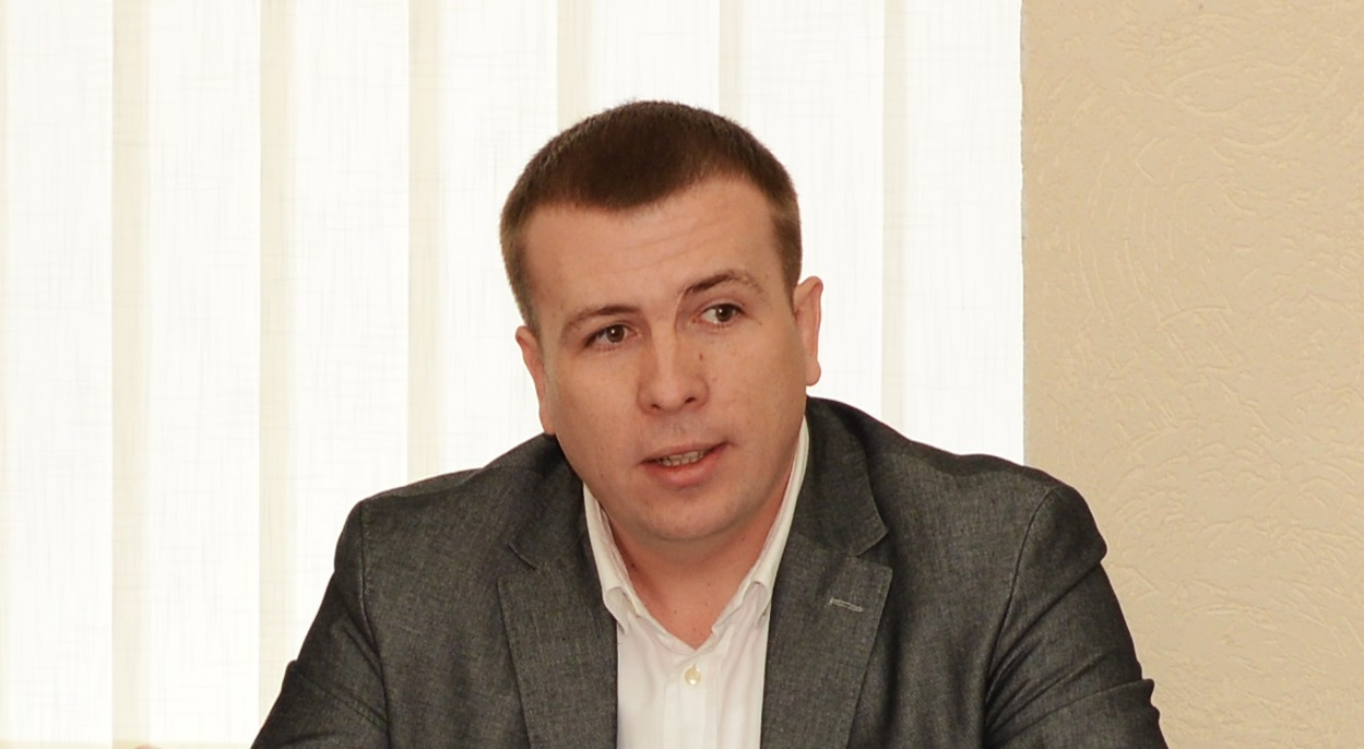 Руденко Вадим Борисович